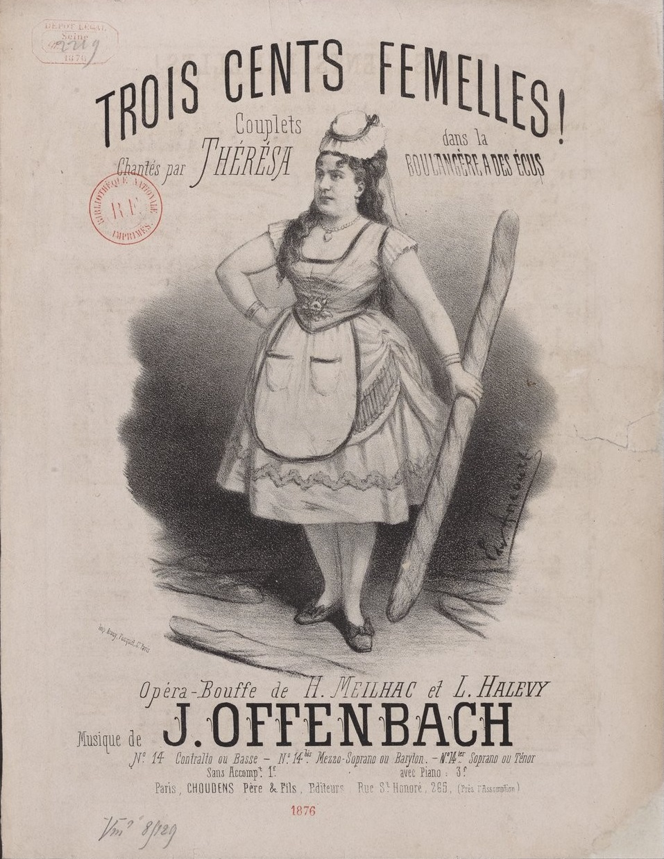 Trois cents femelles, couplets chantés de La Boulangere a des écus, de Jacques Offenbach, chantés par Thérèsa (Emma Valadon). Gravure d'Edward Ancourt